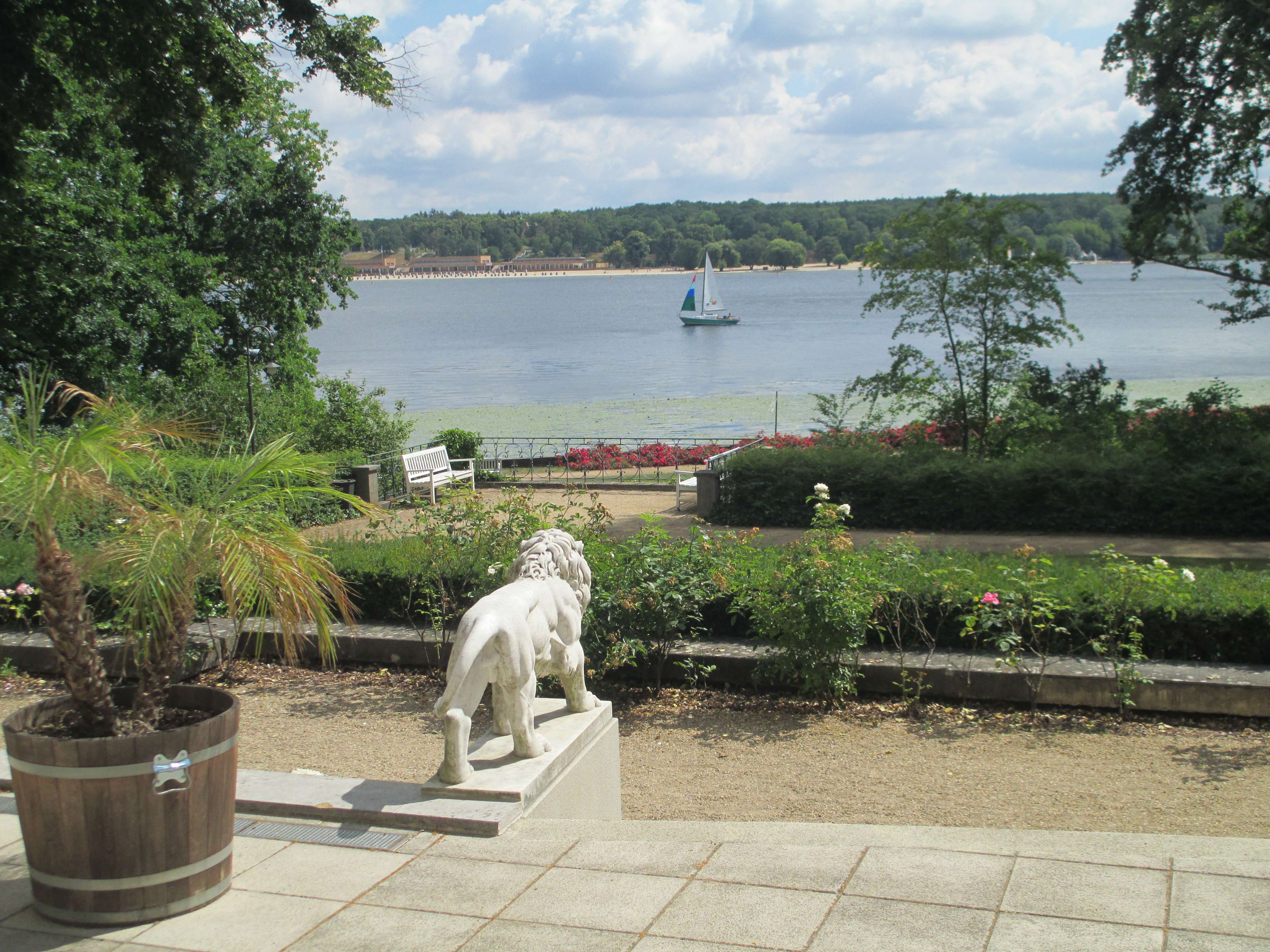 מבט על אגם ואן מווילה ואנזה